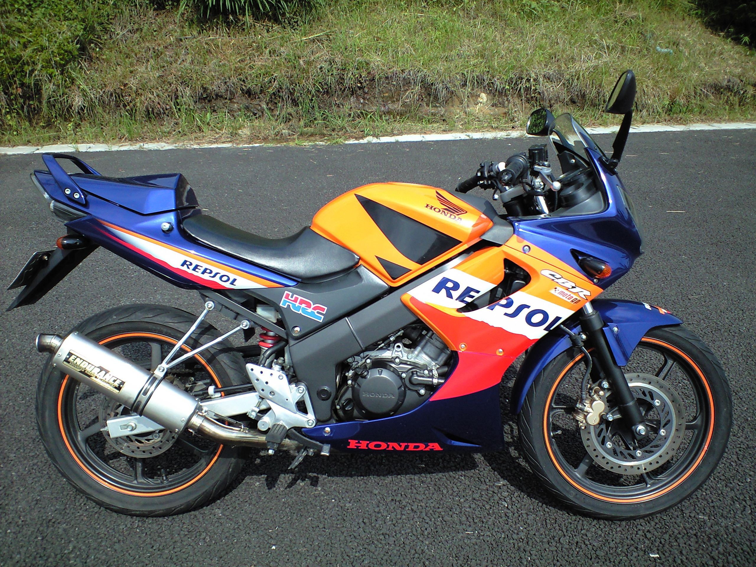 エンデュランス試乗会での試乗車。CBR150R。